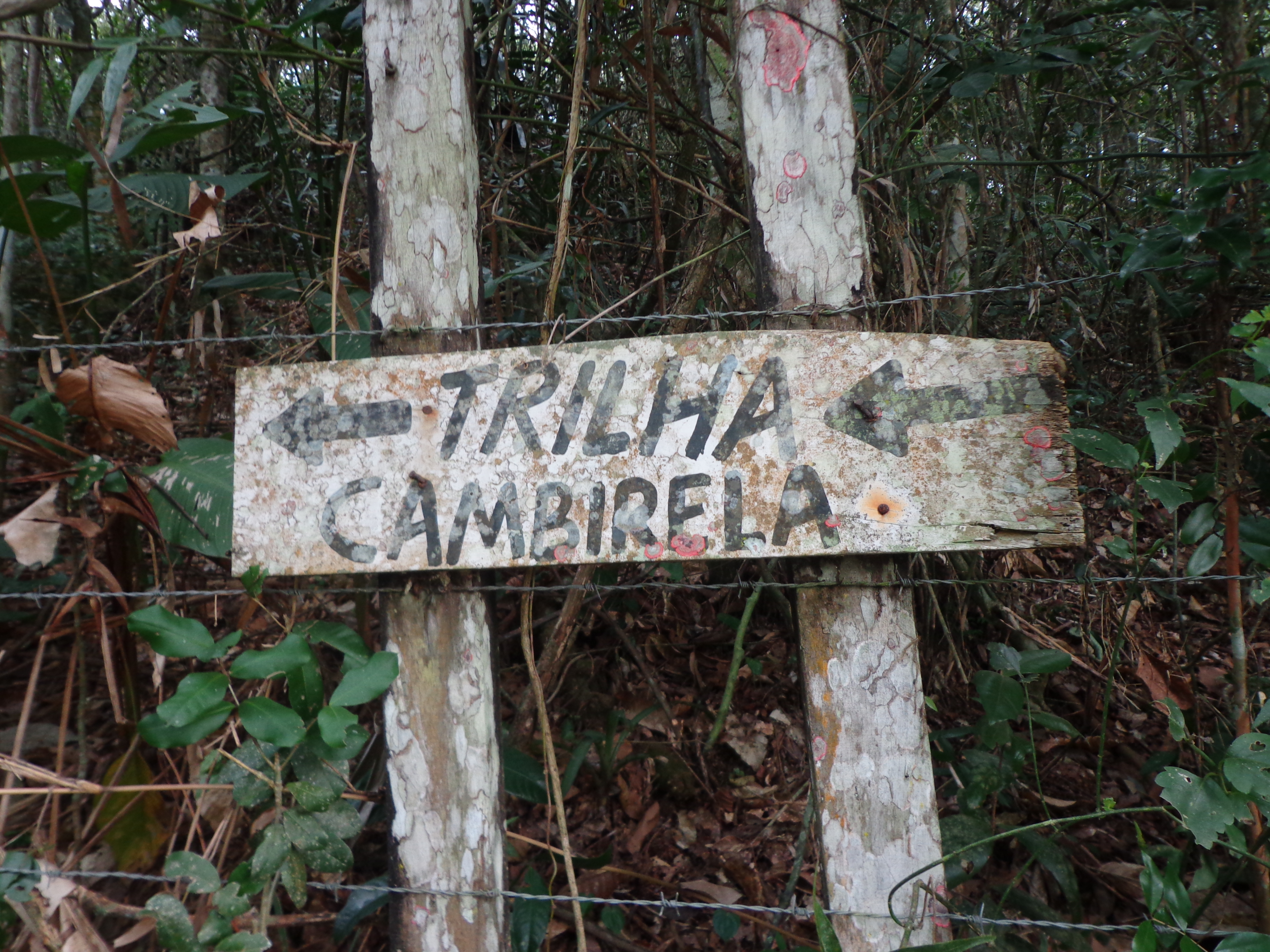 Existe placas de aviso indicando o caminho para subir a montanha Cambirela, no município de Palhoça